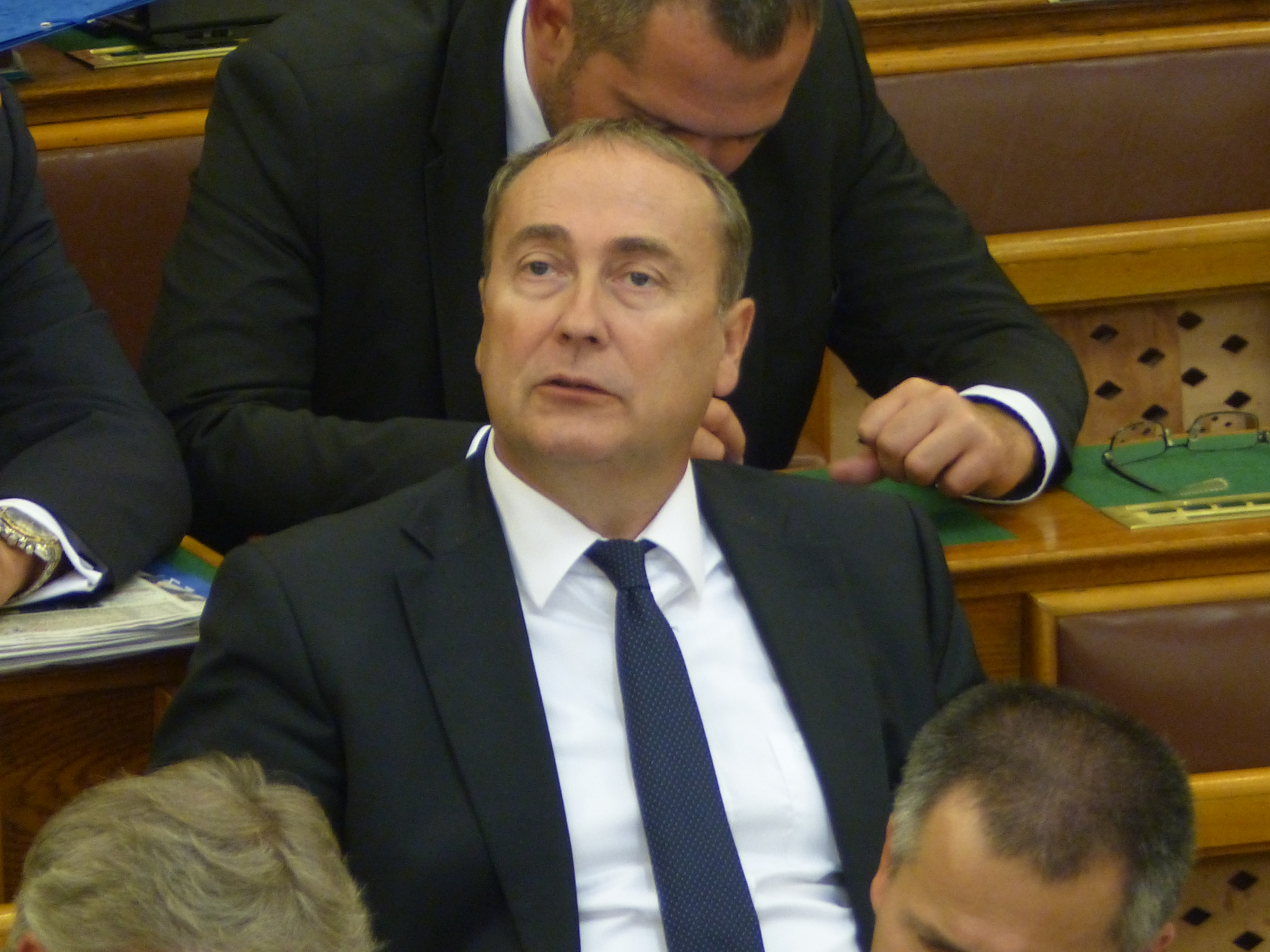 Kovács Zoltán (1957) országgyűlési képviselő (Veszprém megye 4. sz. OEVK)